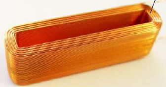 Orthozyklische Wicklung einer rechteckigen Motorspulenspule